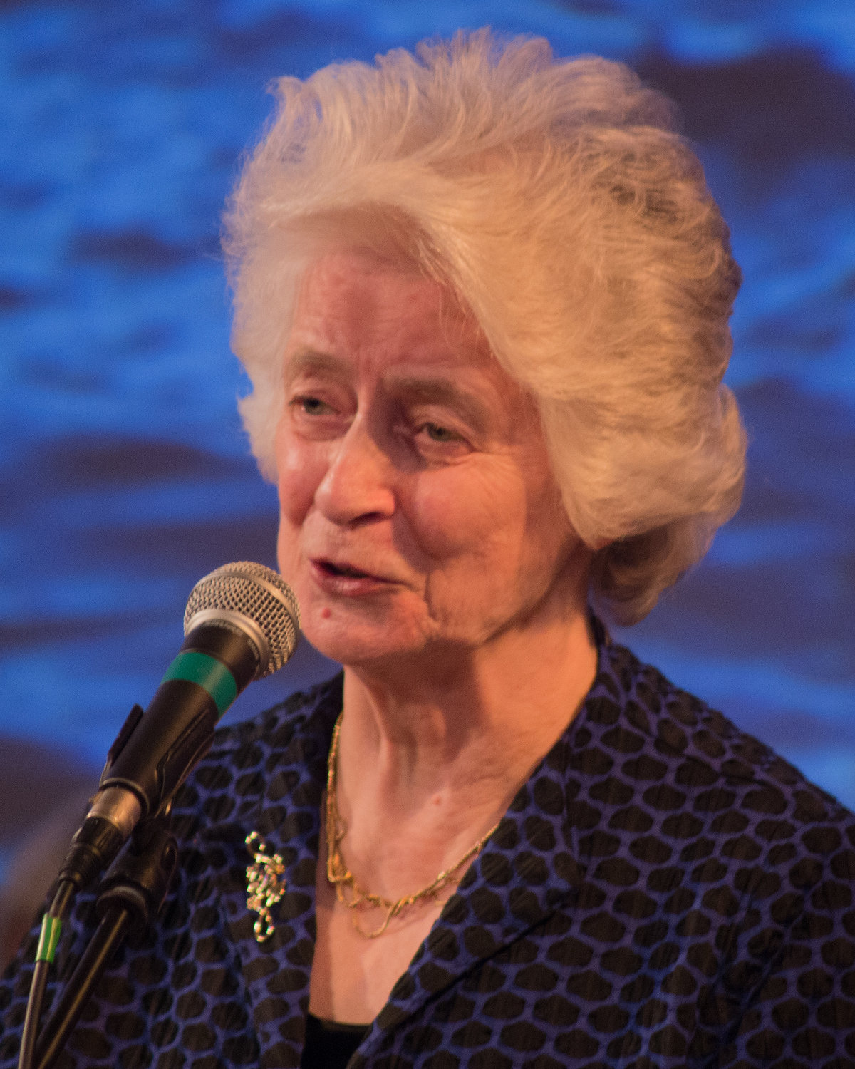 Gàidhlig: Ceana Chaimbeul a’ seinn aig SMO air 2016-04-21